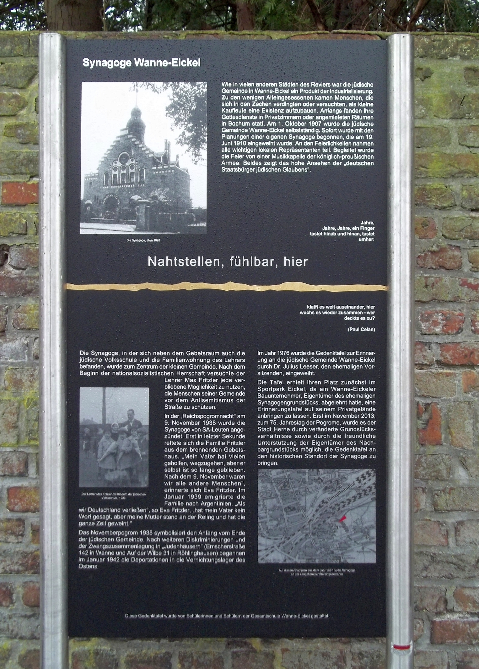 Herne-Wanne Gedenktafel zur ehemaligen Synagoge Wanne-Eickel an der Langekampstrasse